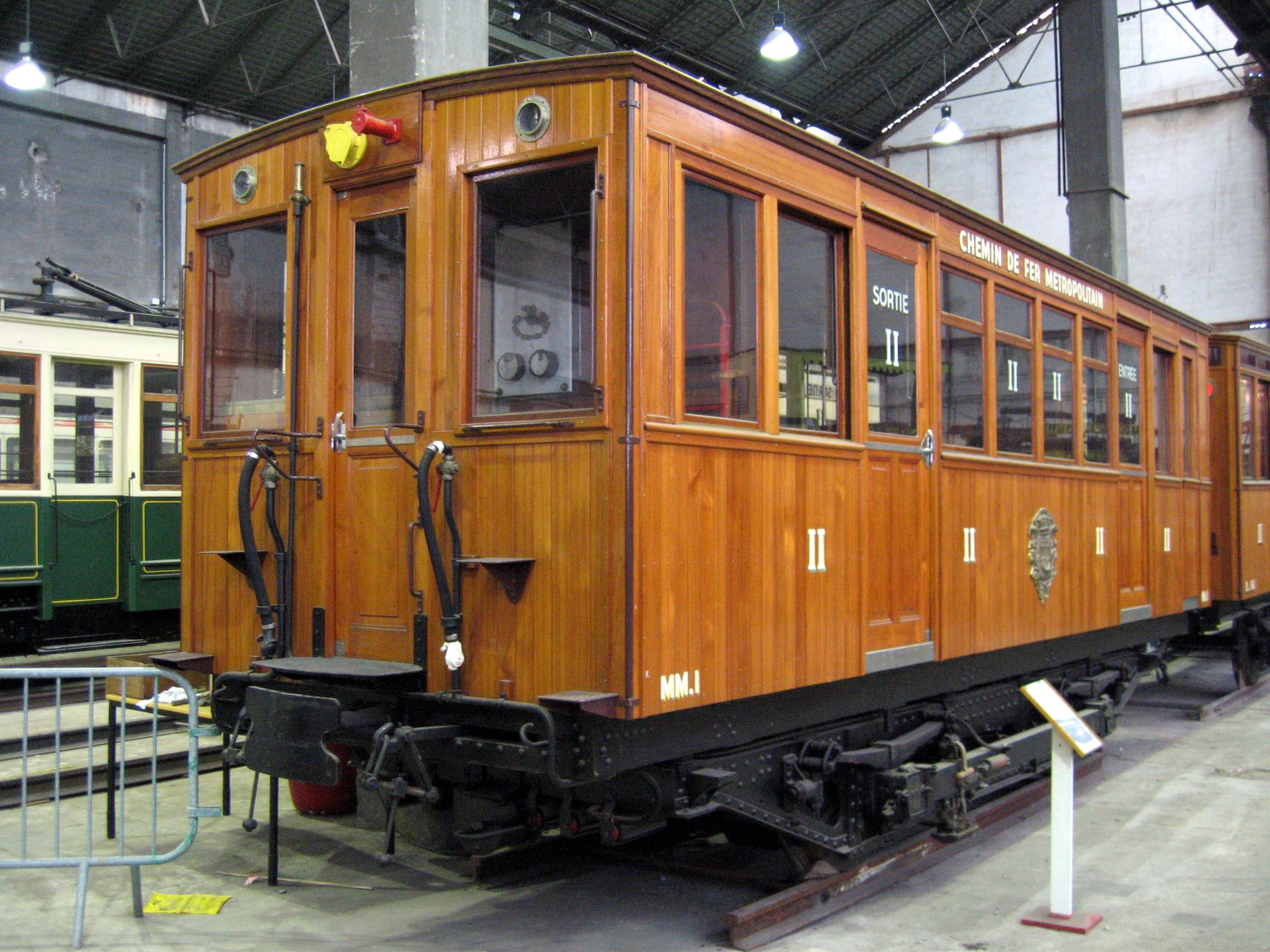 Motrice MM 1 Journées du patrimoine AMTUIR 15/09/2007.